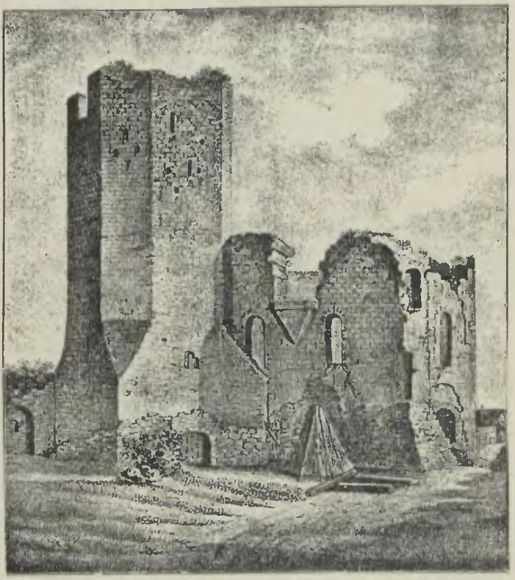 Ruine der Burg Löcknitz im Jahre 1842 (nach Tiedes Pomerania)